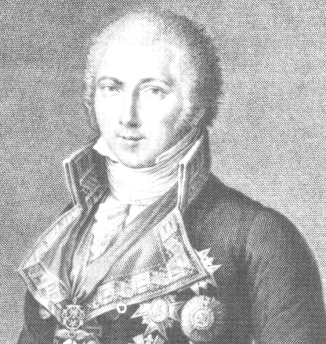 Détail d'un portrait de Manuel Godoy publié sur Wikipédia. Manuel Godoy, grabado de A. L. J. de Laborde en Viaje histórico y pintoresco de España. Encuentro de Fernando VII y Godoy cuando éste era conducido a prisión. Grabado de la época.